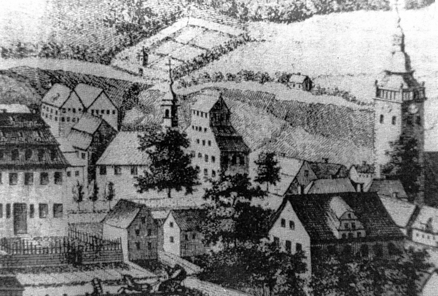 Sankt Antonius und die gemarker Kirche auf einem Kupferstich von 1788